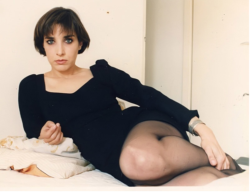 חגית דסברג מתוך הסרט גולם במעגל